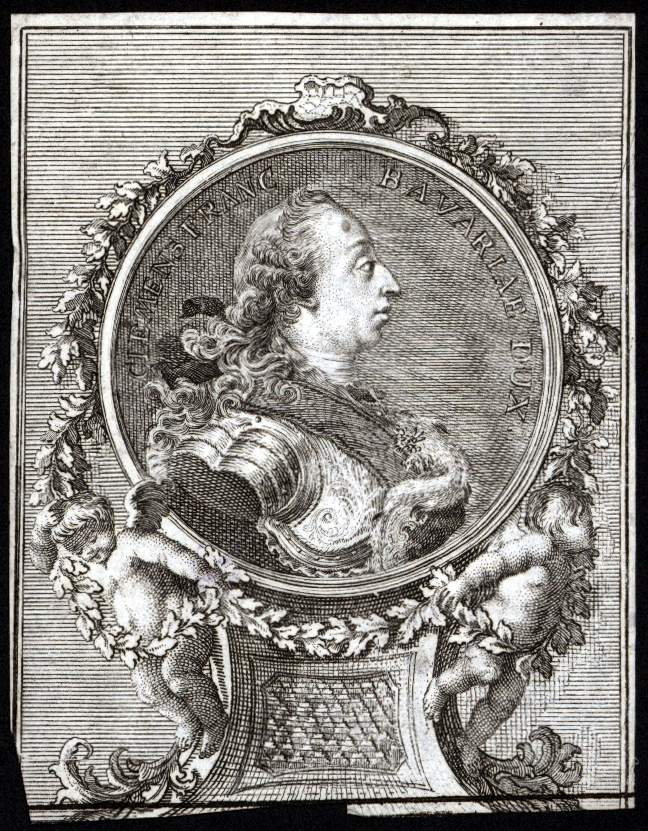 Clemens Franz de Paula von Bayern (1722-1770)